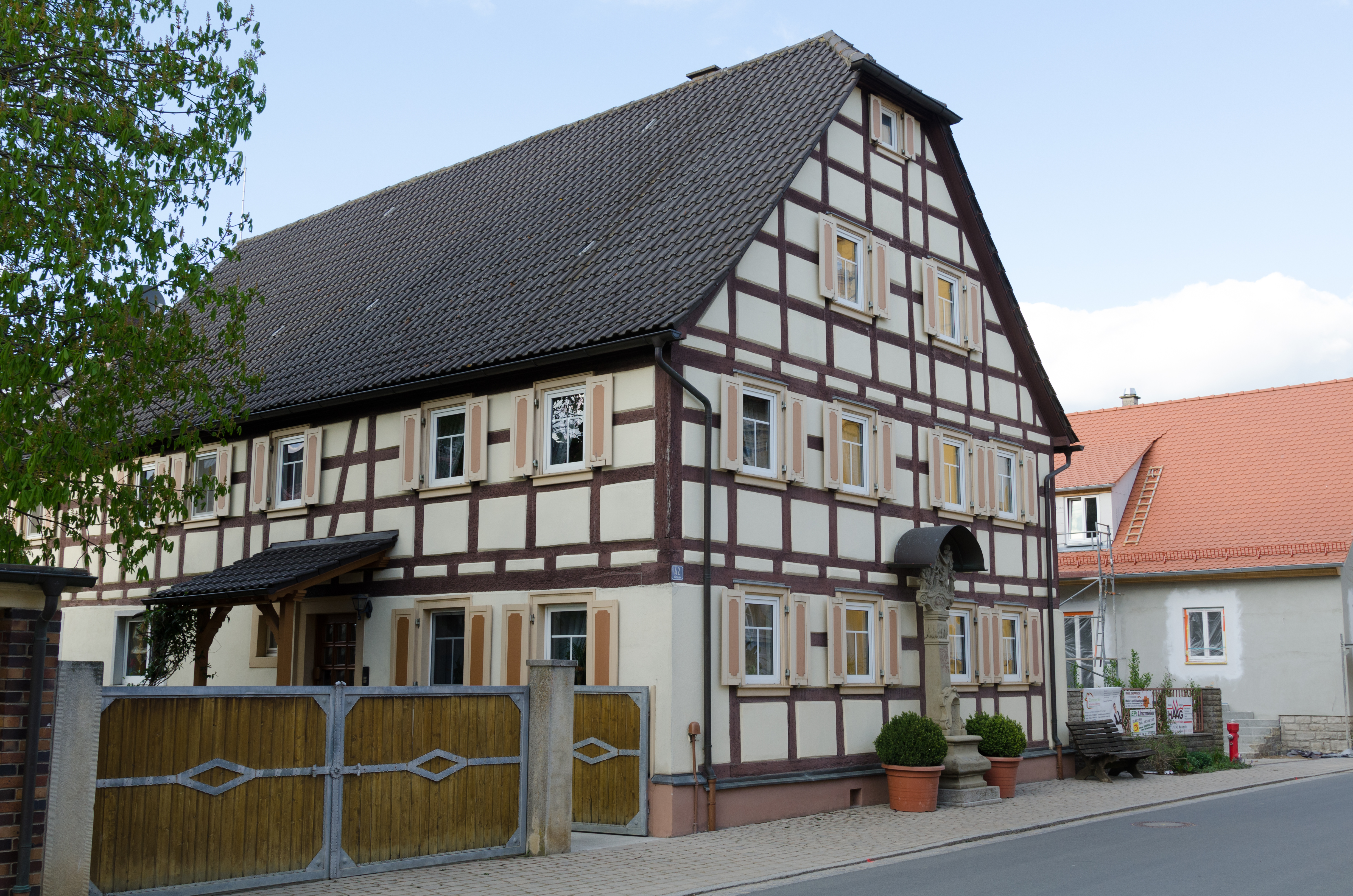 Hemmersheim, Dorfstraße 42